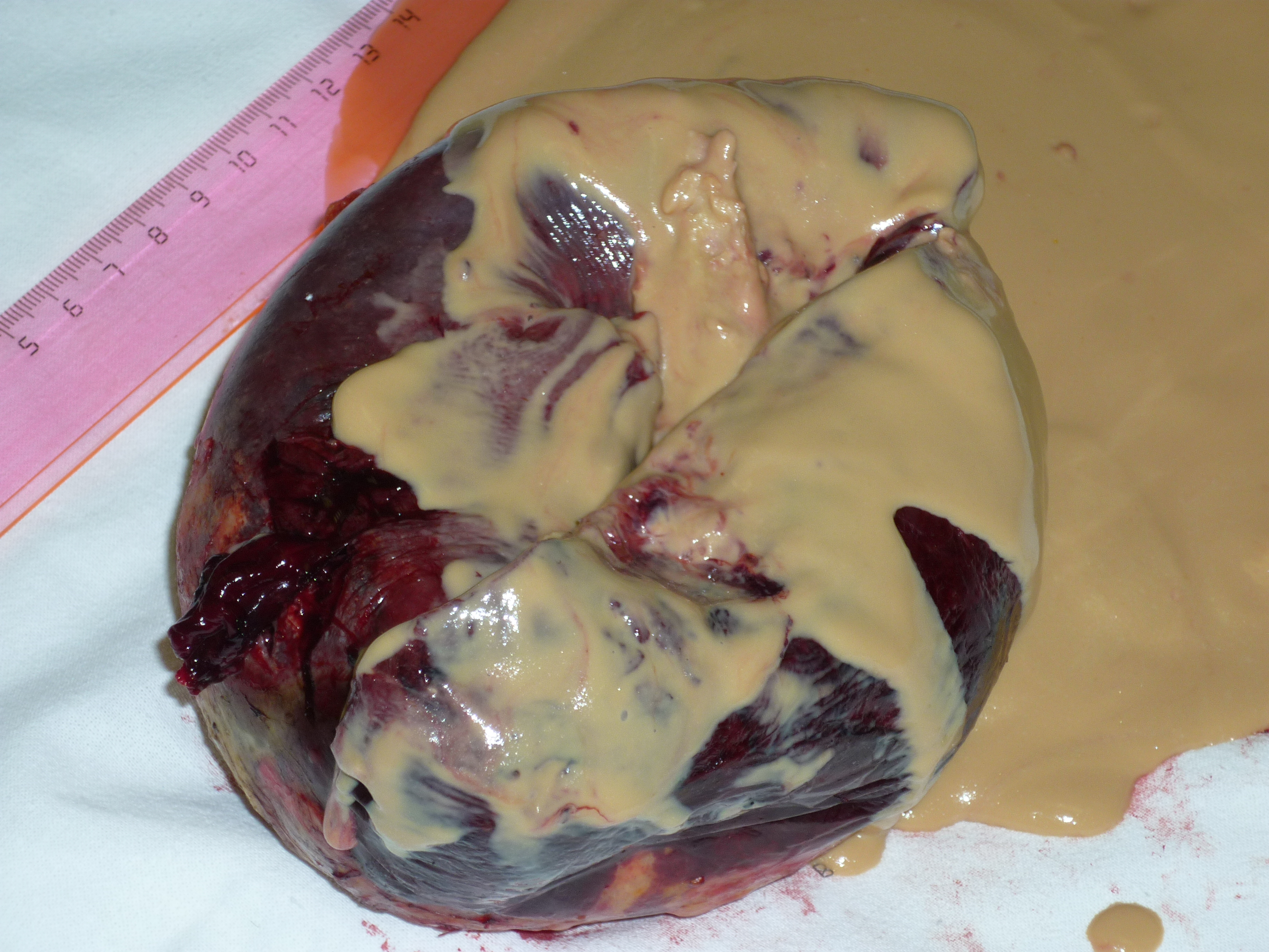 Селезенка после спленэктомии. При разрезе препарата началось обильное выделение гнойного экссудата